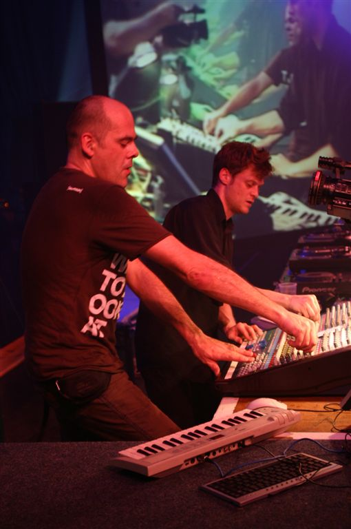 IMG_7526 Der Dritte Raum, Hessentag 2006